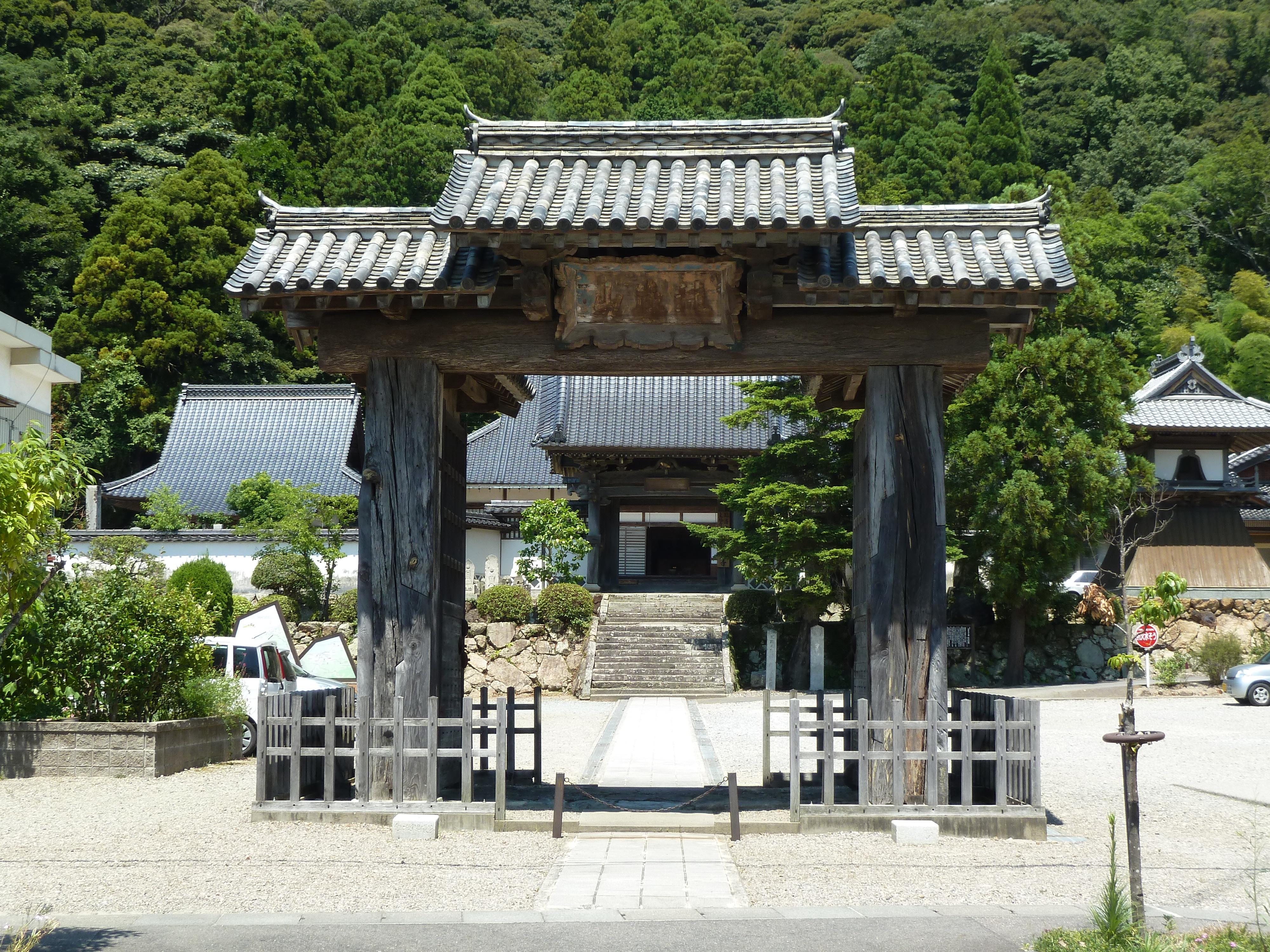 医光寺の総門